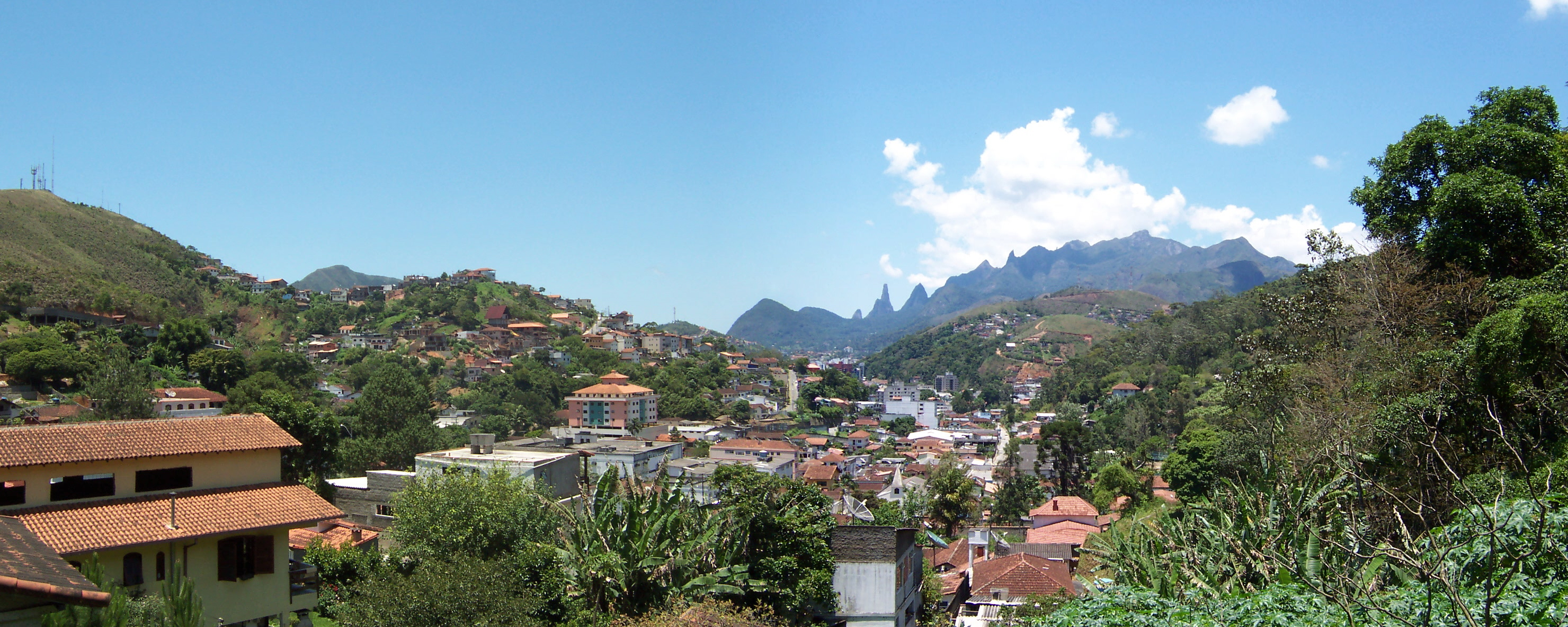 Teresópolis - RJ